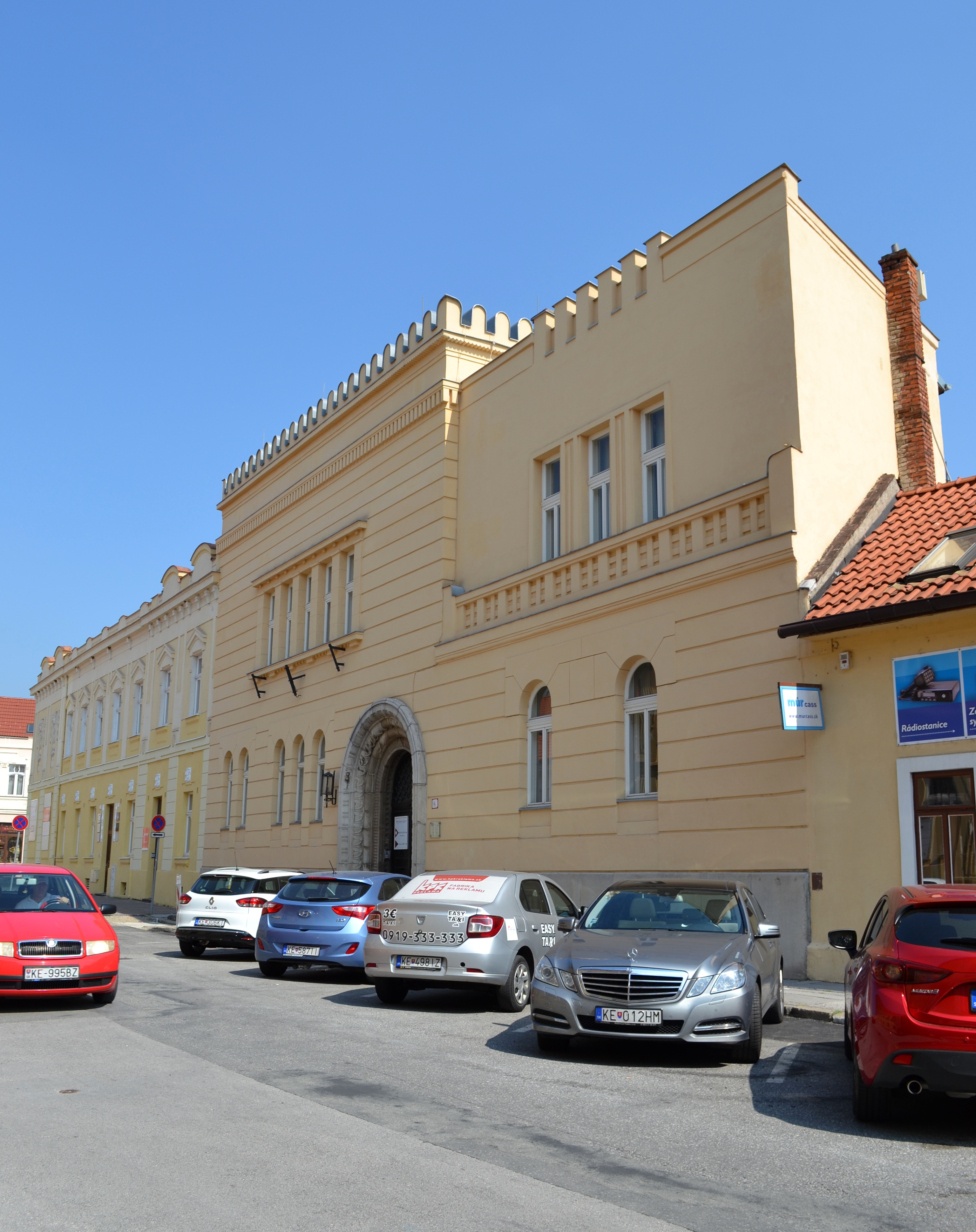 Pamätný dom (Bábkové divadlo) na Tajovského ulici 4 v Košiciach